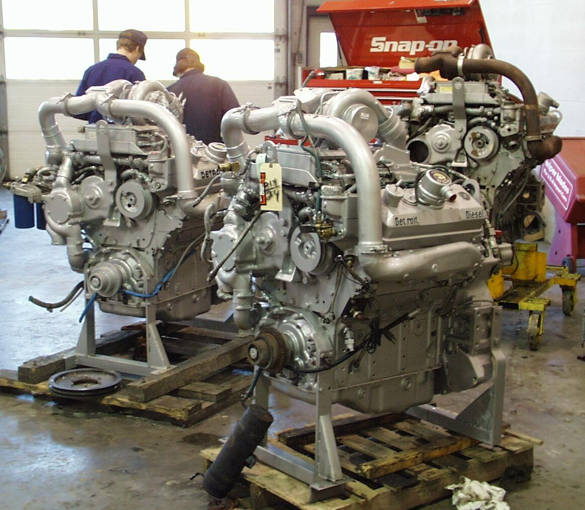 TCAT Depot 6V92 Detroit Diesel Engines